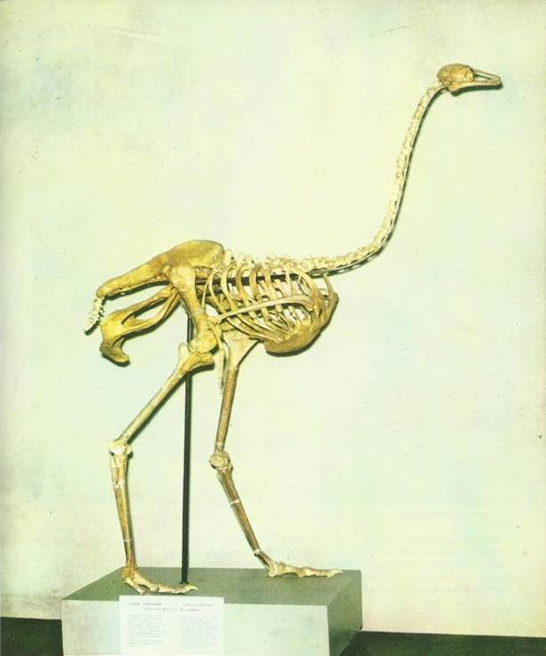 Скелет Страуса Азиатского (Struthio asiaticus)